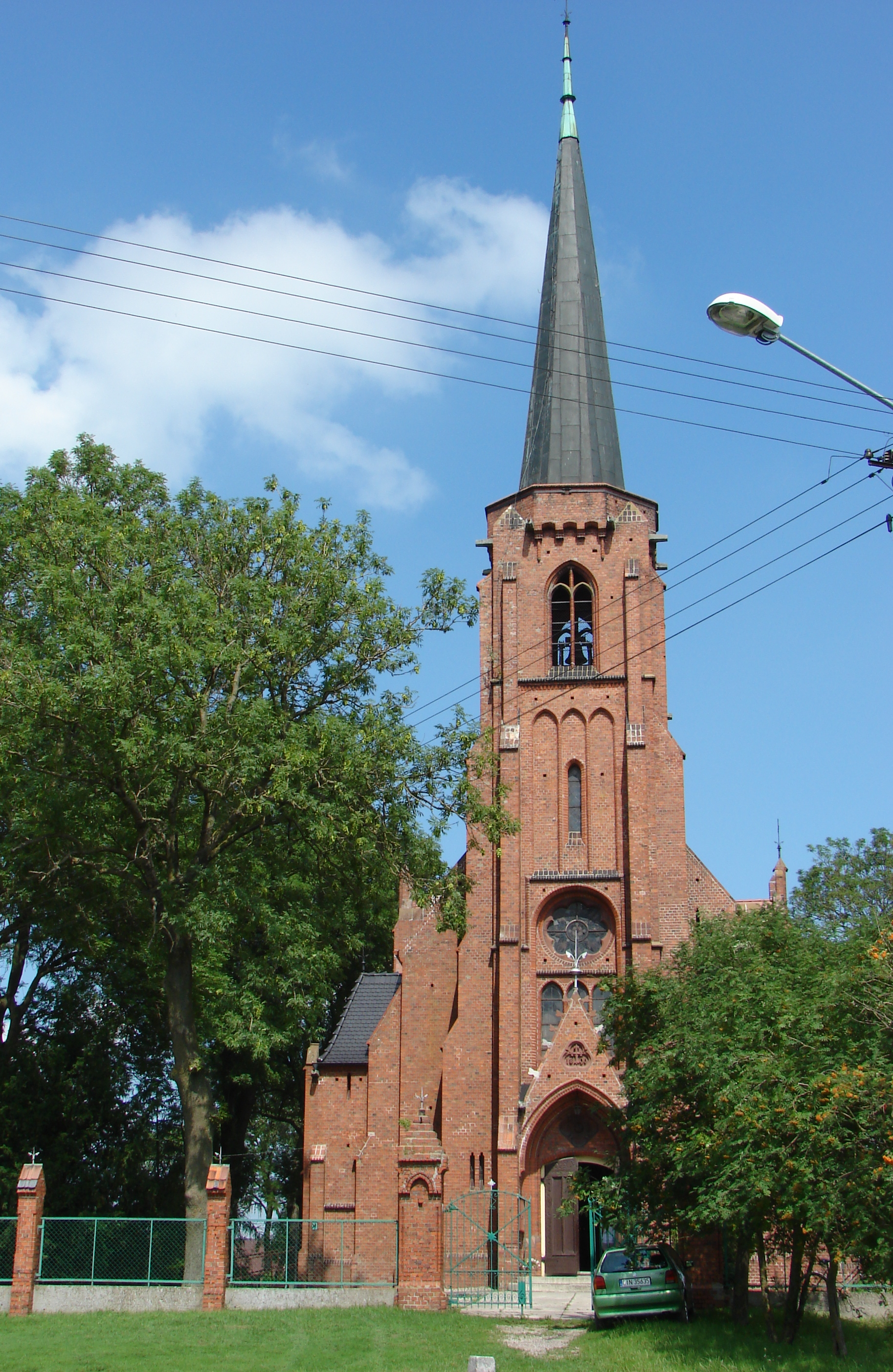 Tuczno, Gmina Złotniki Kujawskie, kościół z 1890.